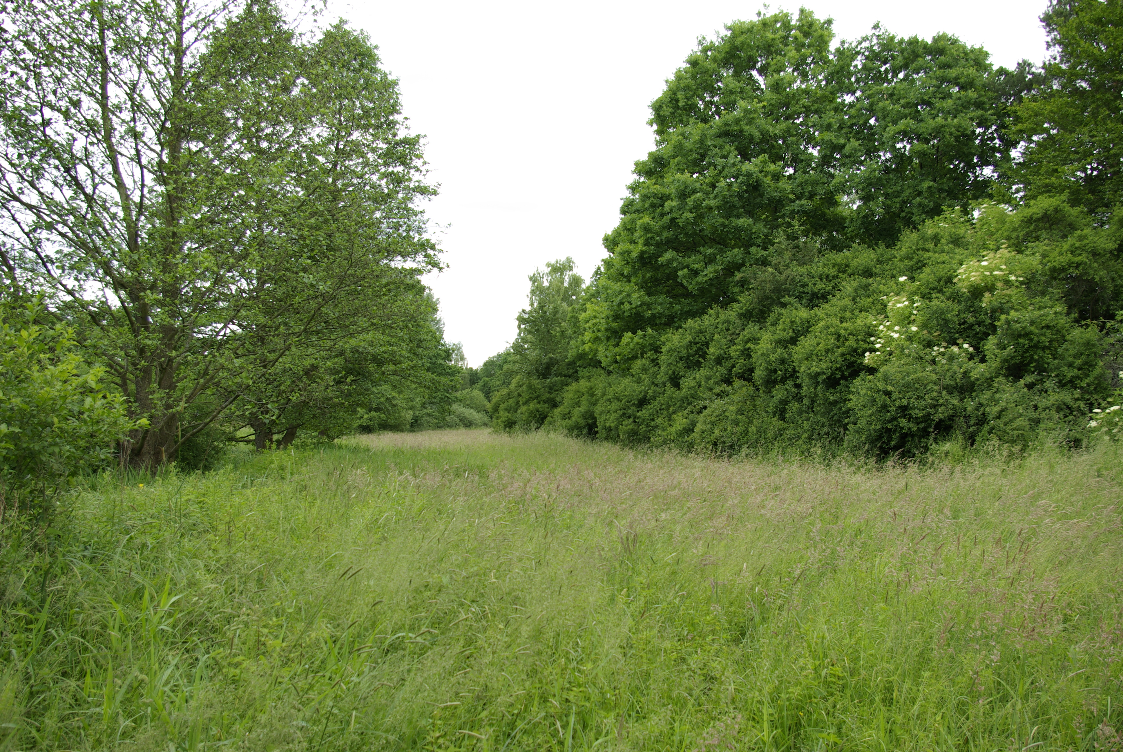 Der Bachgraben im gleichnamigen Landschaftsschutzgebiet im Erlanger Stadtteil Bruck.